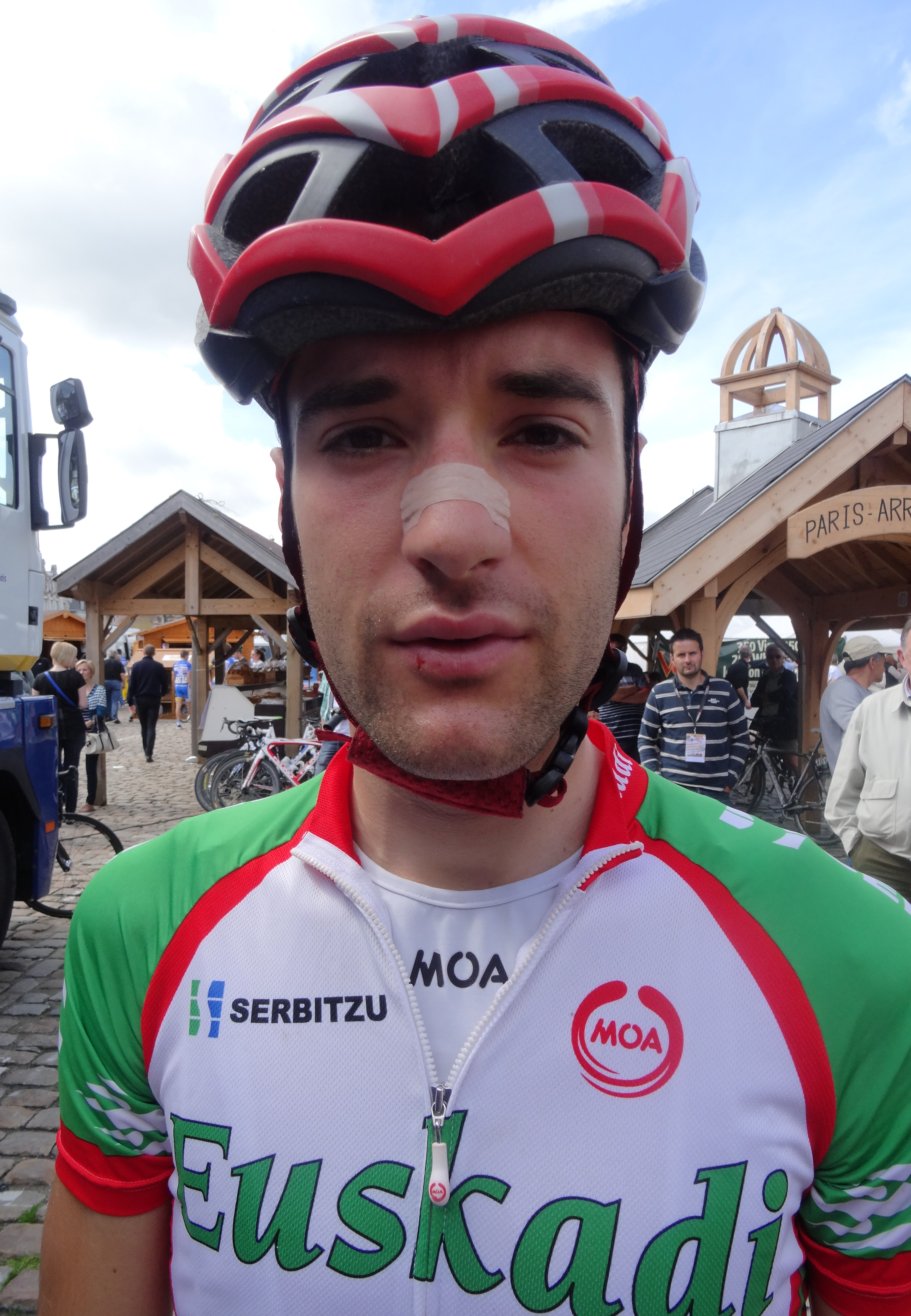 Reportage photographique réalisé le dimanche 25 mai 2014 à l'occasion du départ et de l'arrivée de la troisième étape du Paris-Arras Tour 2014 à Arras, Pas-de-Calais, Nord-Pas-de-Calais, France. Depicted person: Beñat Txoperena Depicted team: Euskadi